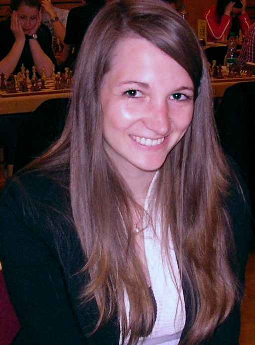 Monika Seps, 15. Internationales Neckar-Open (April 2011 in Deizisau).